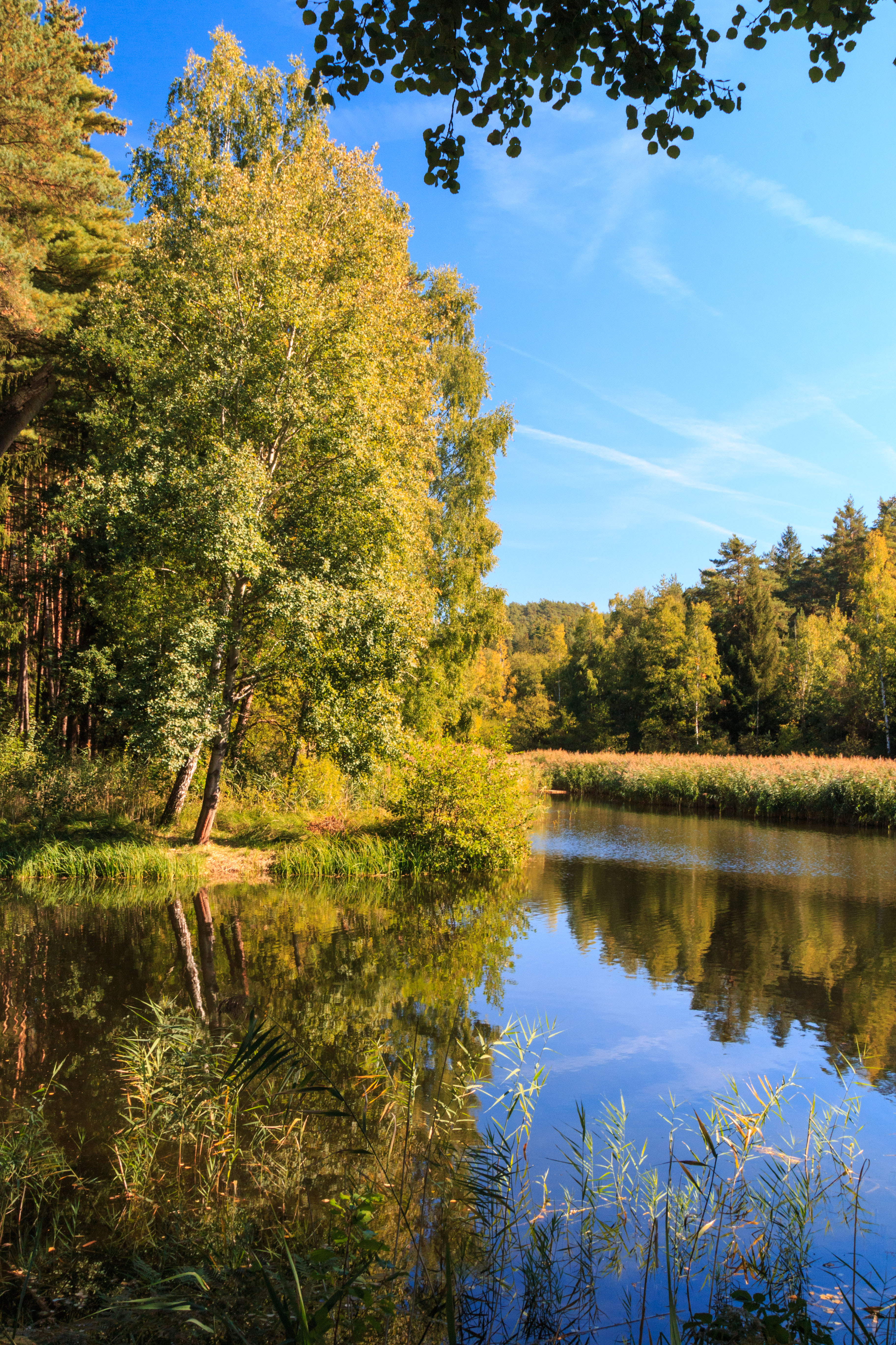 Farářský rybník u Drhlen Project: Vodstvo.